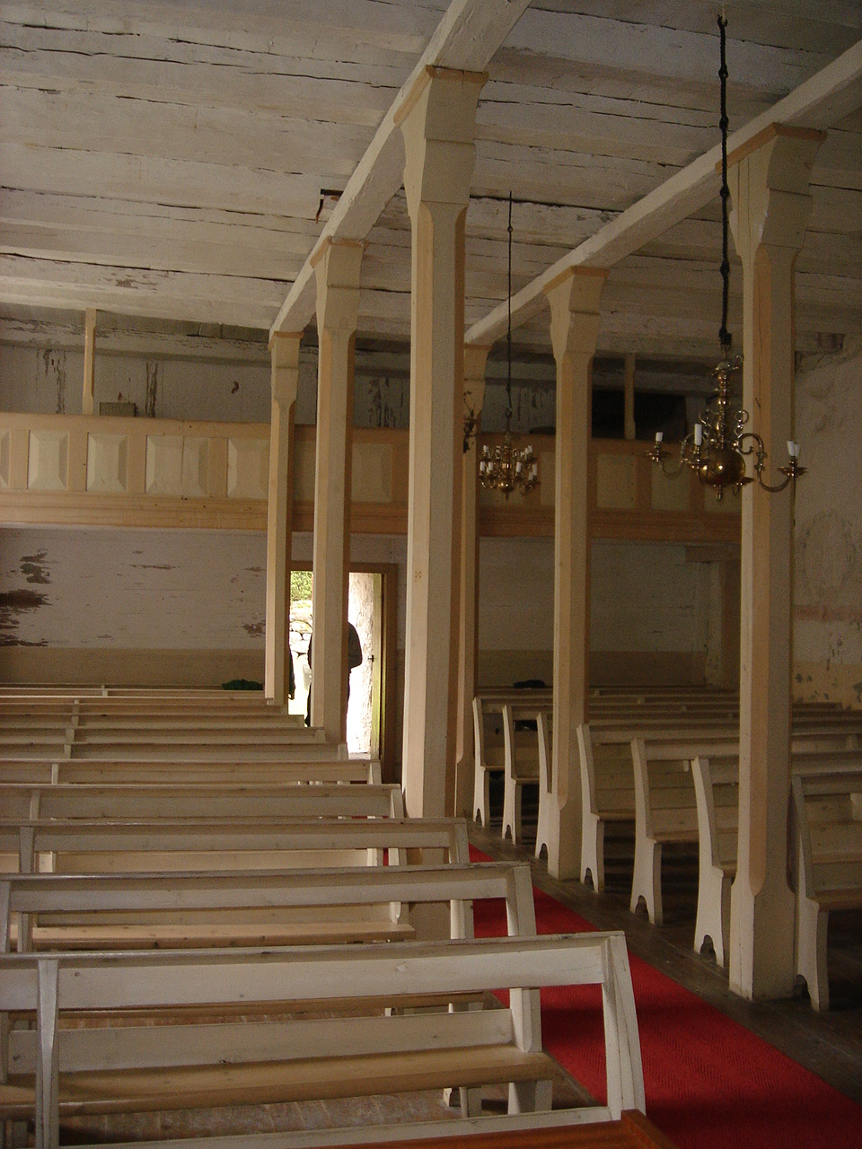 Benkene iKvamsøy kyrkje, Kvamsøy kirke,Benches inKvamsøy Church